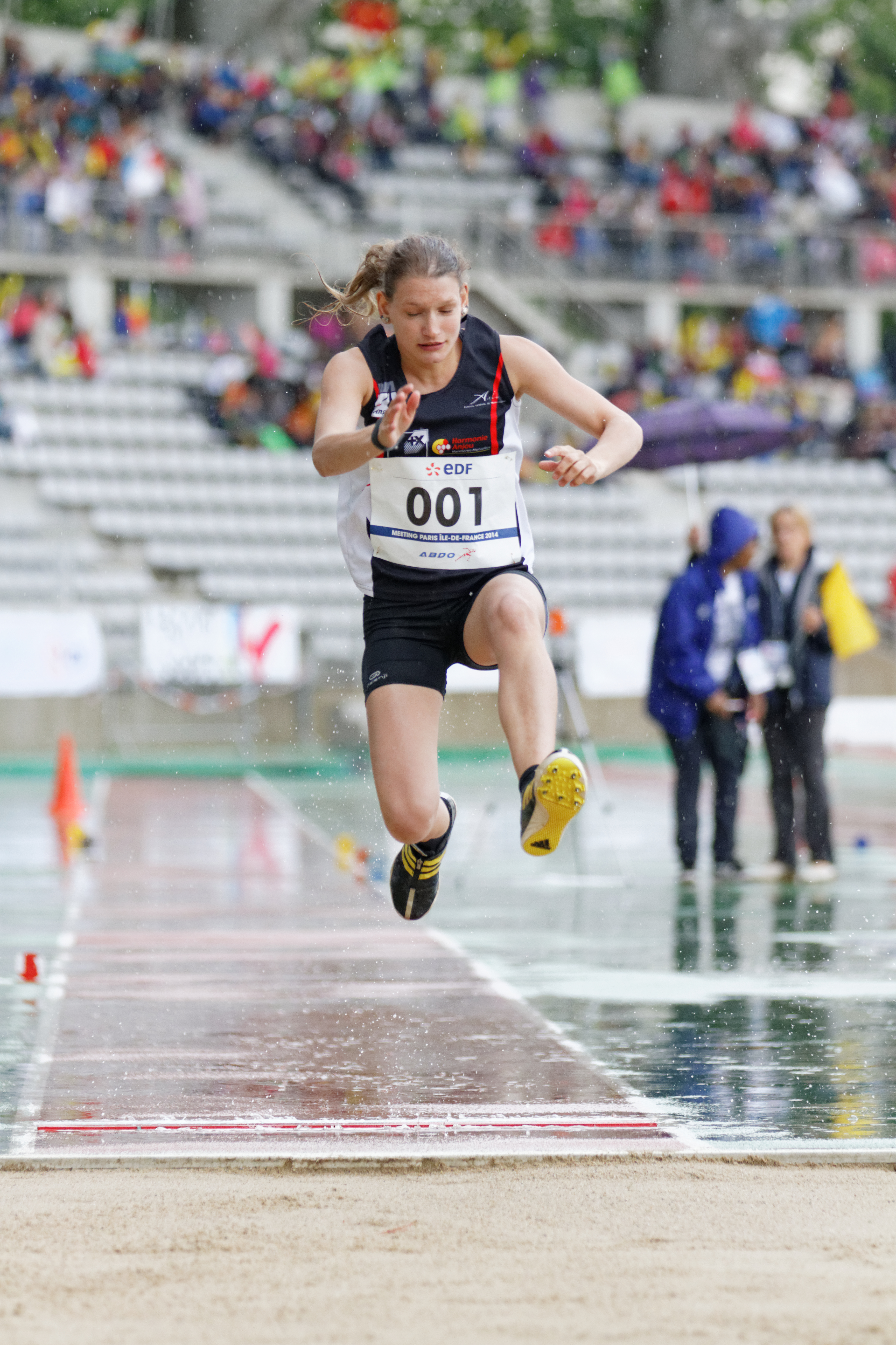 Virginie Dreux, saut en longueur, Meeting d'Athlétisme Paralympique de Paris, 4 juin 2014.